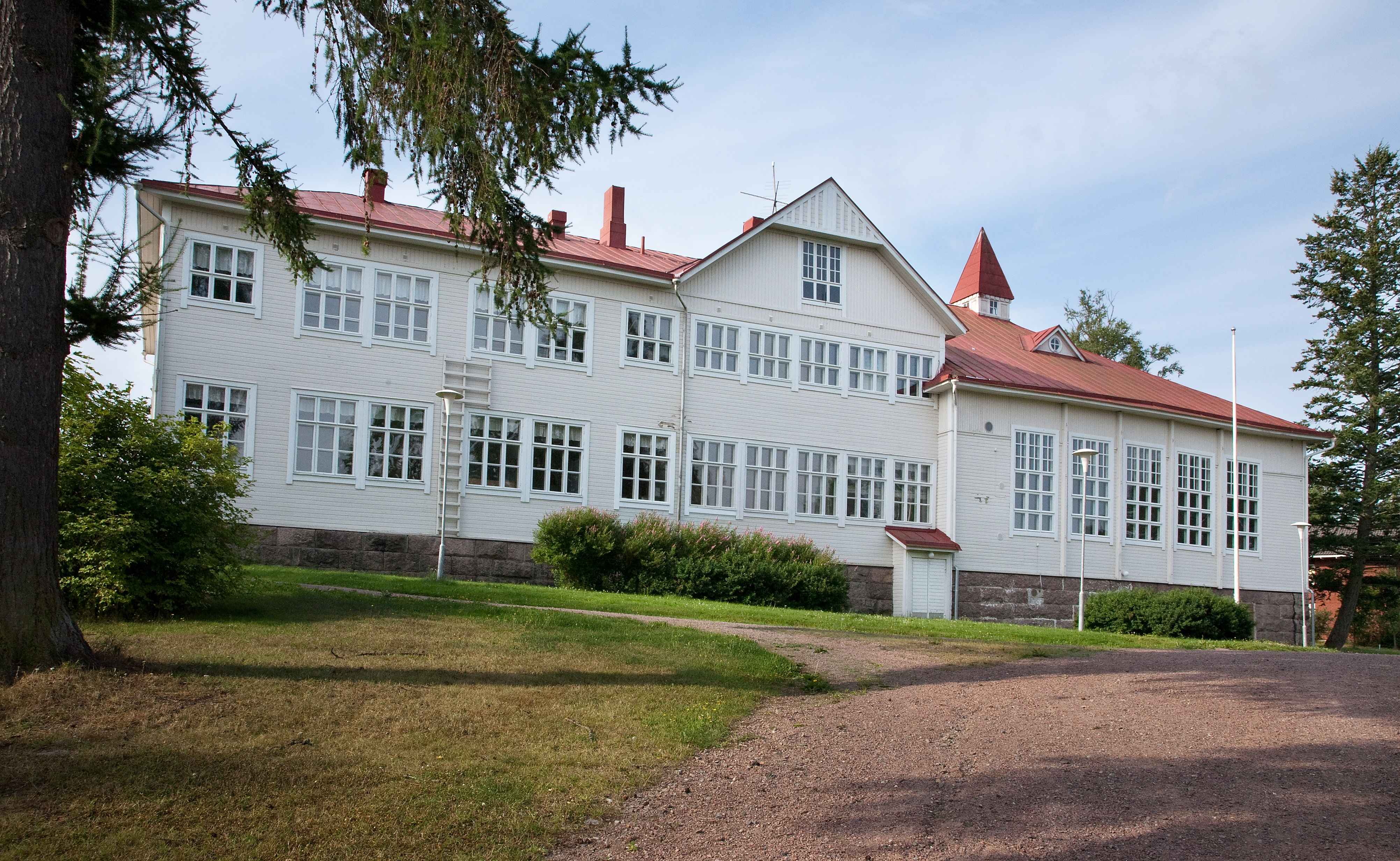 Kokemäen vanha yhteiskoulu. Kuva rannan puolelta.